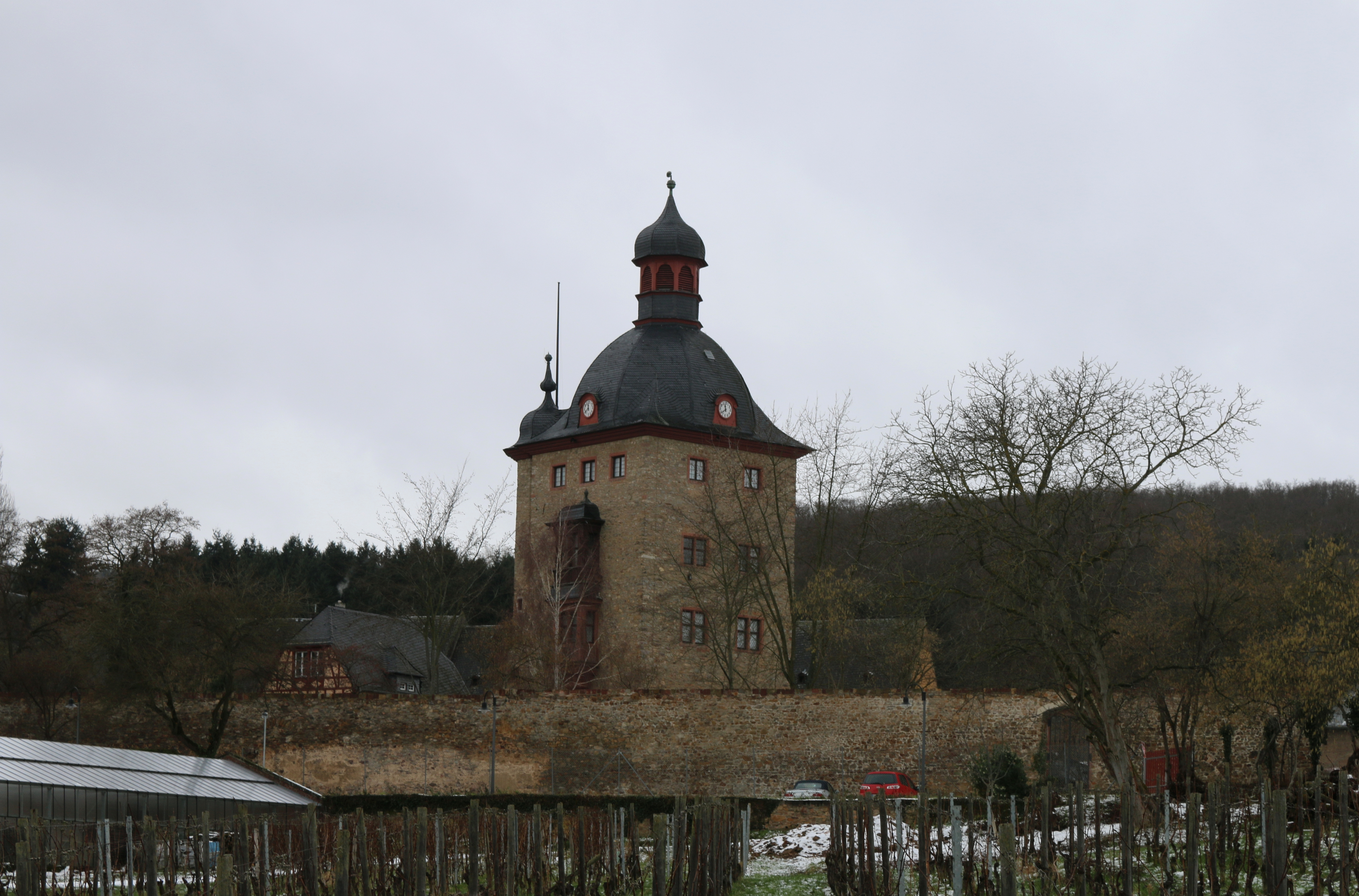 Winkel, Rheingau: Der Wehrturm von Schloss Vollrads